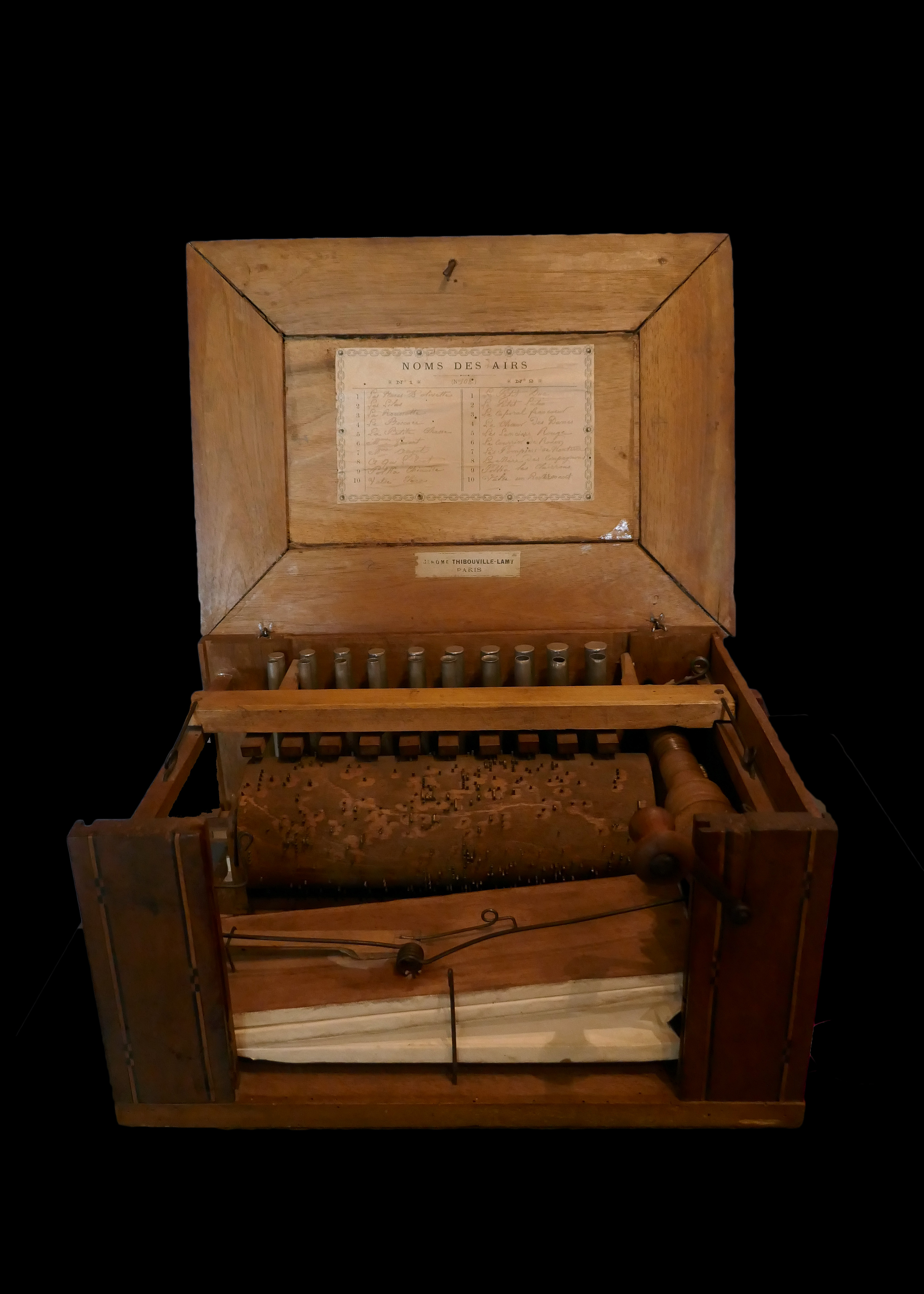 Merline Jérôme Thibouville-Lamy Mirecourt, fin du XIXe siècle 20 tuyaux, 2 registres, 2 cylindres interchangeables Maison de la musique mécanique à Mirecourt